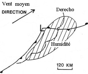 Position des éléments météorologiques pour la formation d'un Derecho de saison froide. Des lignes de grains en arc de forment dans le secteur chaud d'un dépression parallèlement au front froid et dans l'axe d'humidité maximale. Elles se déplace séquentiellement avec le vent moyen d'altitude.